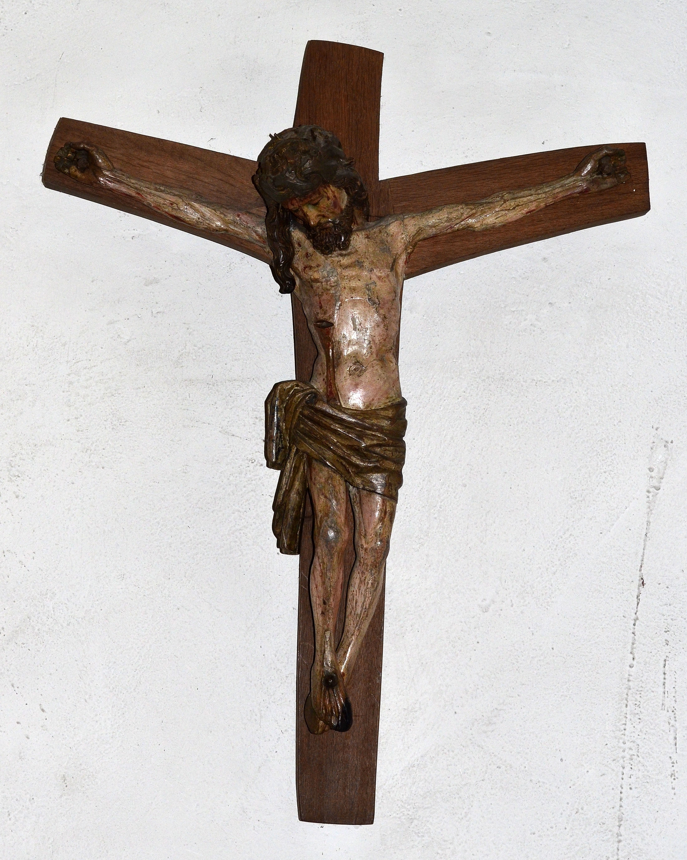 Heringhausen, Diemelsee, Kirche St. Barbara, Kruzifix